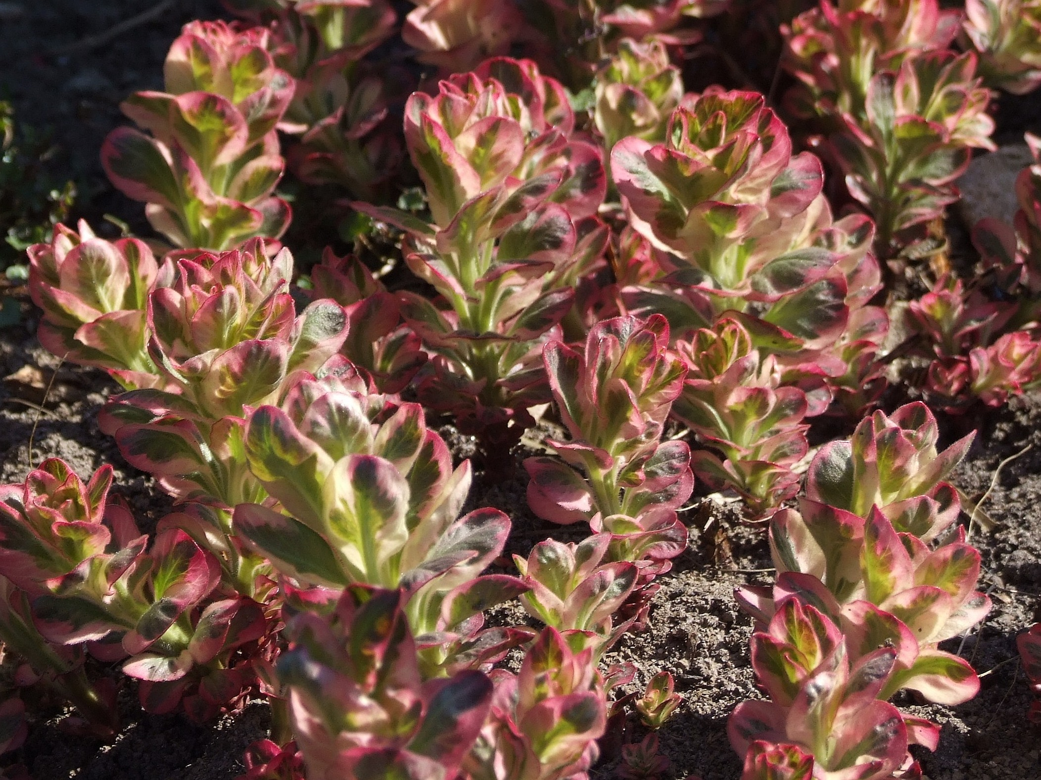 Lysimachia punctata 'Alexander'